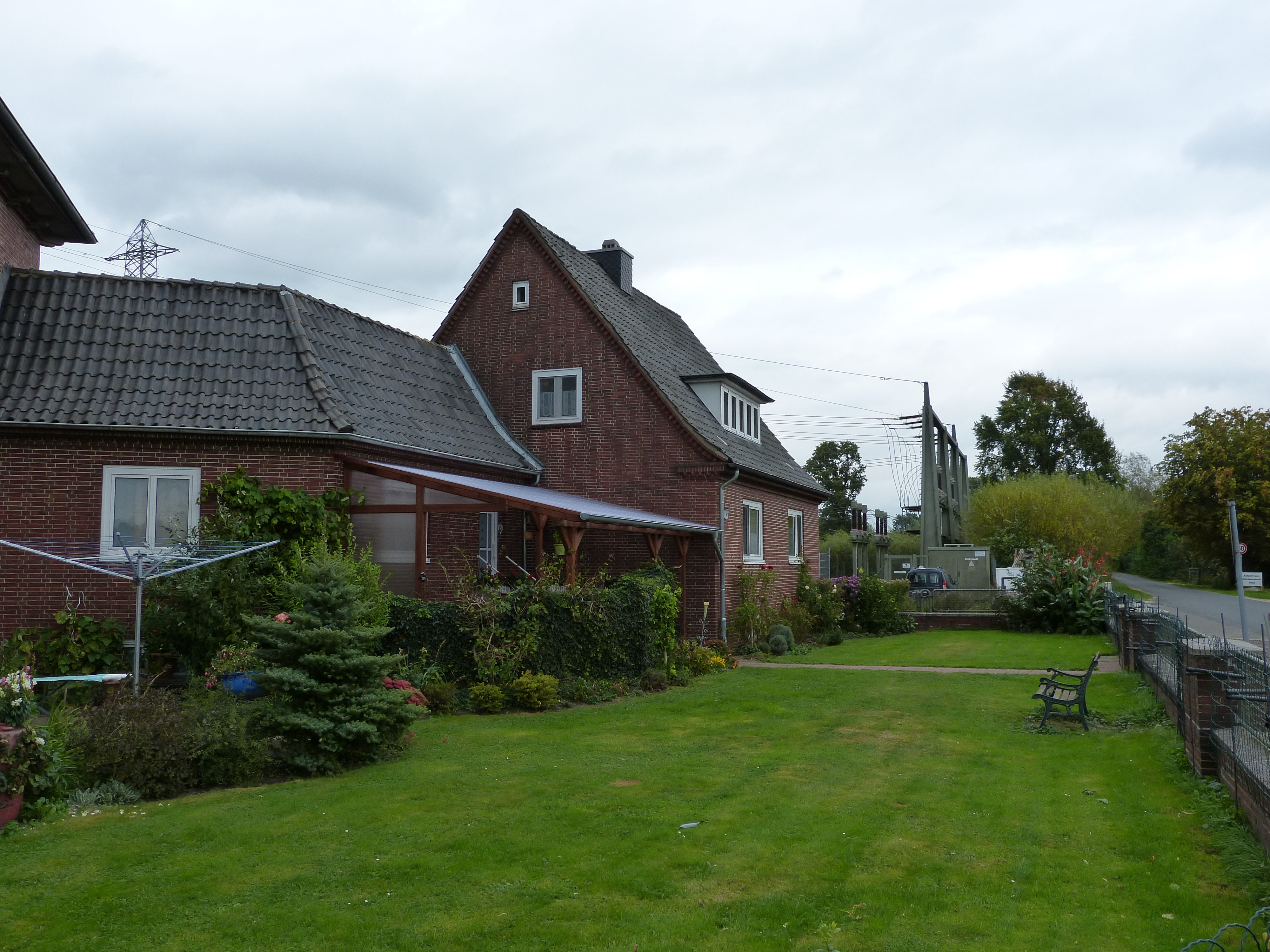 Das Bild zeigt das ehemalige Schleswag Betriebsgebäude mit Wohnhaus in Heede (Holstein), Ziegeleiweg 16.